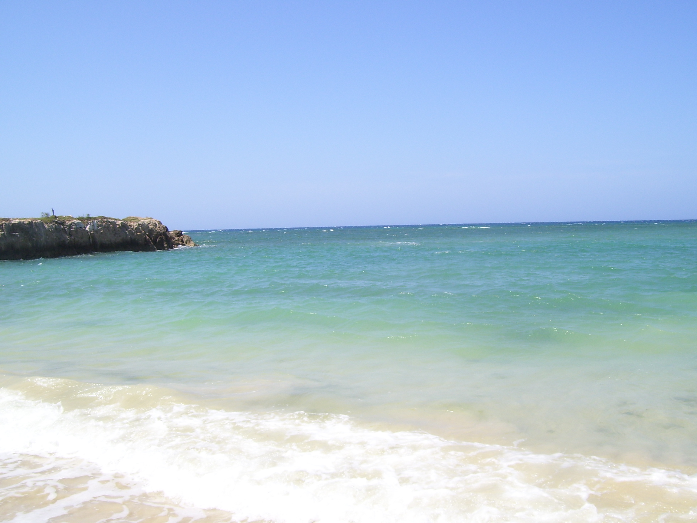 playa grande en luperon